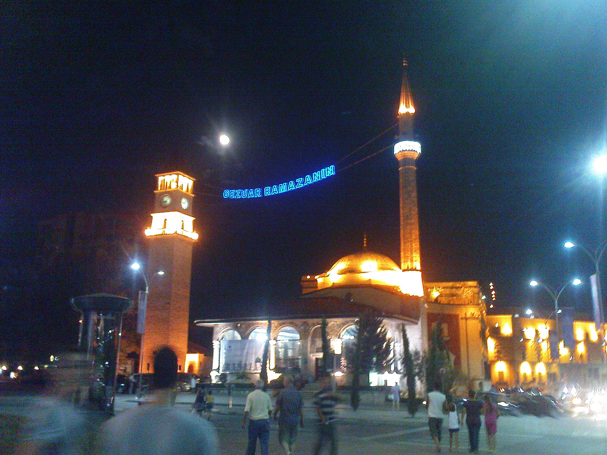 Xhamia e Ethem Beut